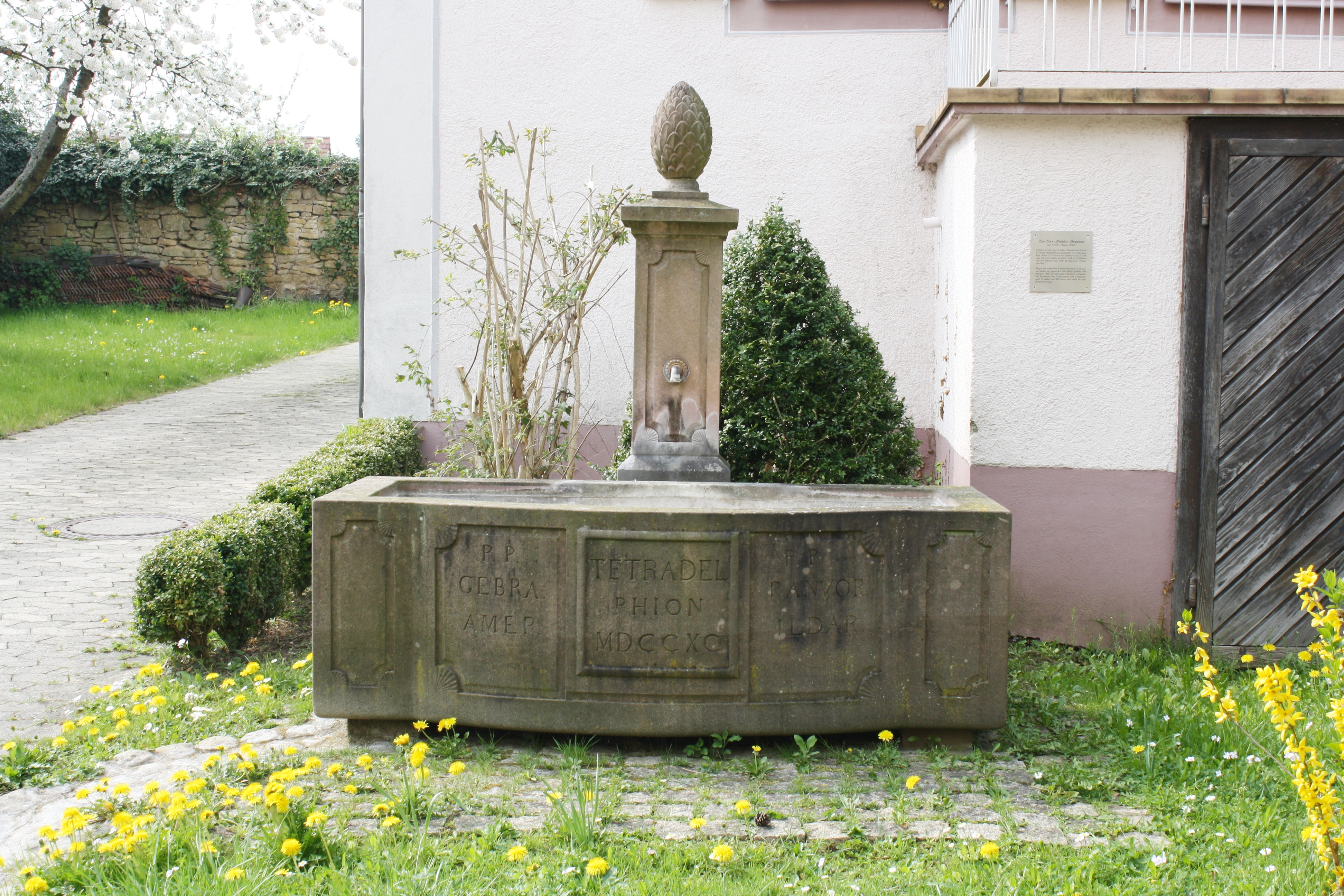 Tetradelphion-Brunnen vor dem Pfarrhaus in D-79285 Ebringen, errichtet 1790 von vier von St. Gallen nach Ebringen exilierten Mönchen, die sich links und rechts mit den ersten Silben ihrer Namen verewigten. Rechts oben auf dem Brunnen PANVOR für Pankraz Vorster, der spätere letzte Sankt Galler Fürstabt, rechts unten ILDAR für Ildefons von Arx, Verfasser der ersten Ebringer Dorfchronik.